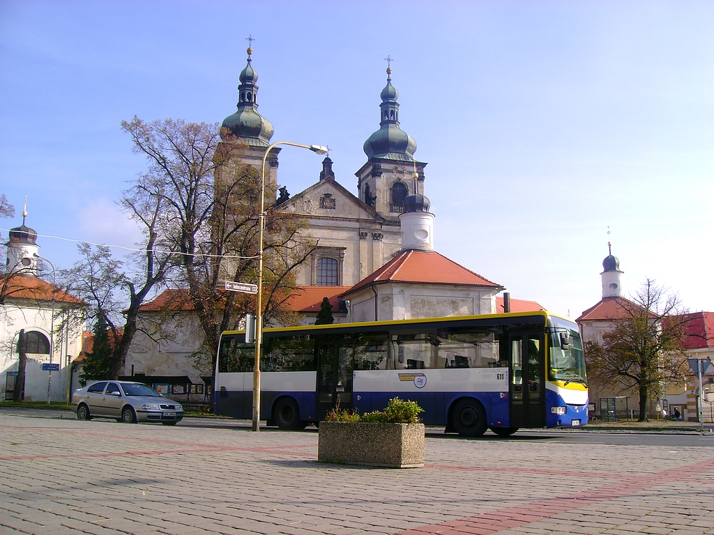 Autobus Iveco Irisbus Crossway ev.č. 611 na lince 142 přes poutním kostelem Panny Marie Sedmibolestné v Bohosudově